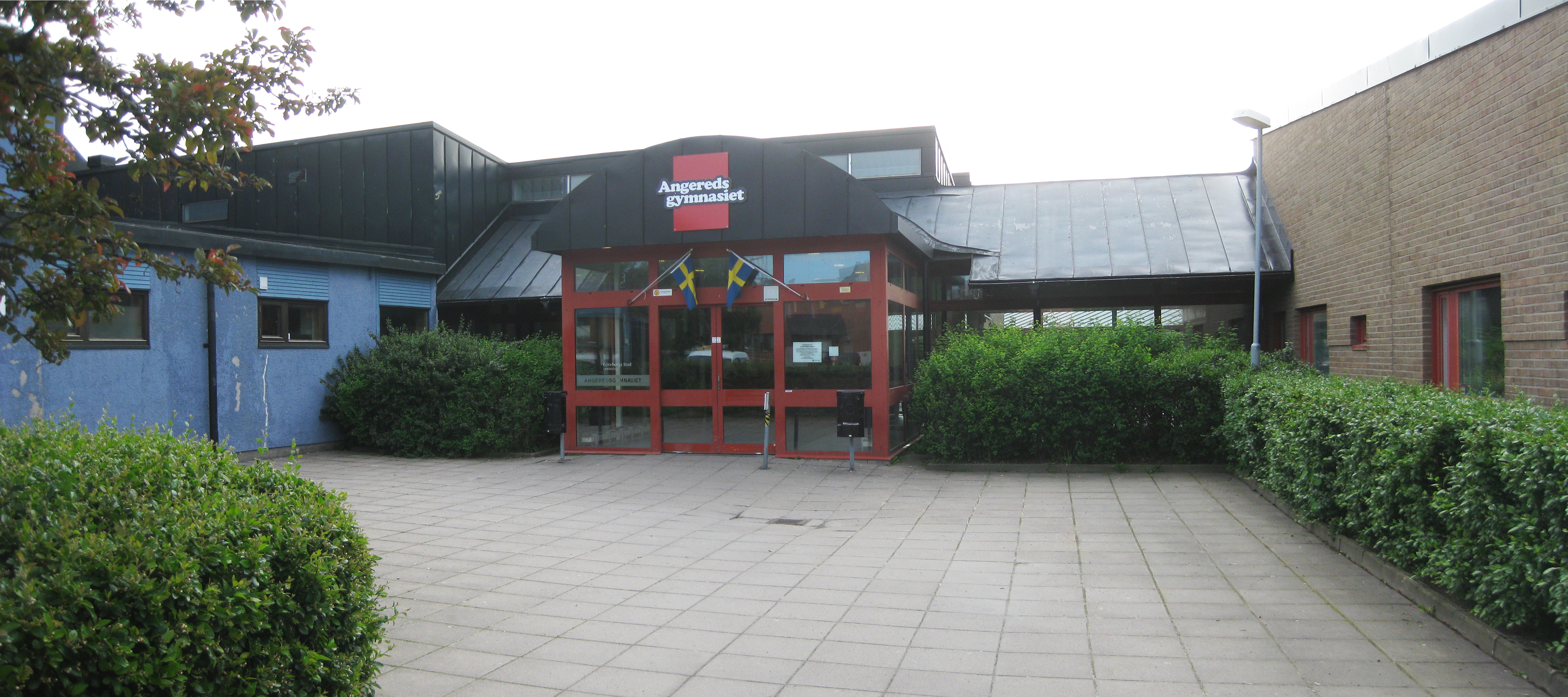 Entrén till Angeredsgymnasiet i Göteborg.